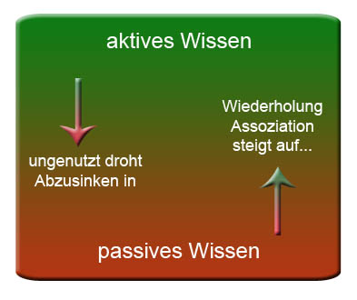 Grafik zum Verhältnis aktives Passives Wissen